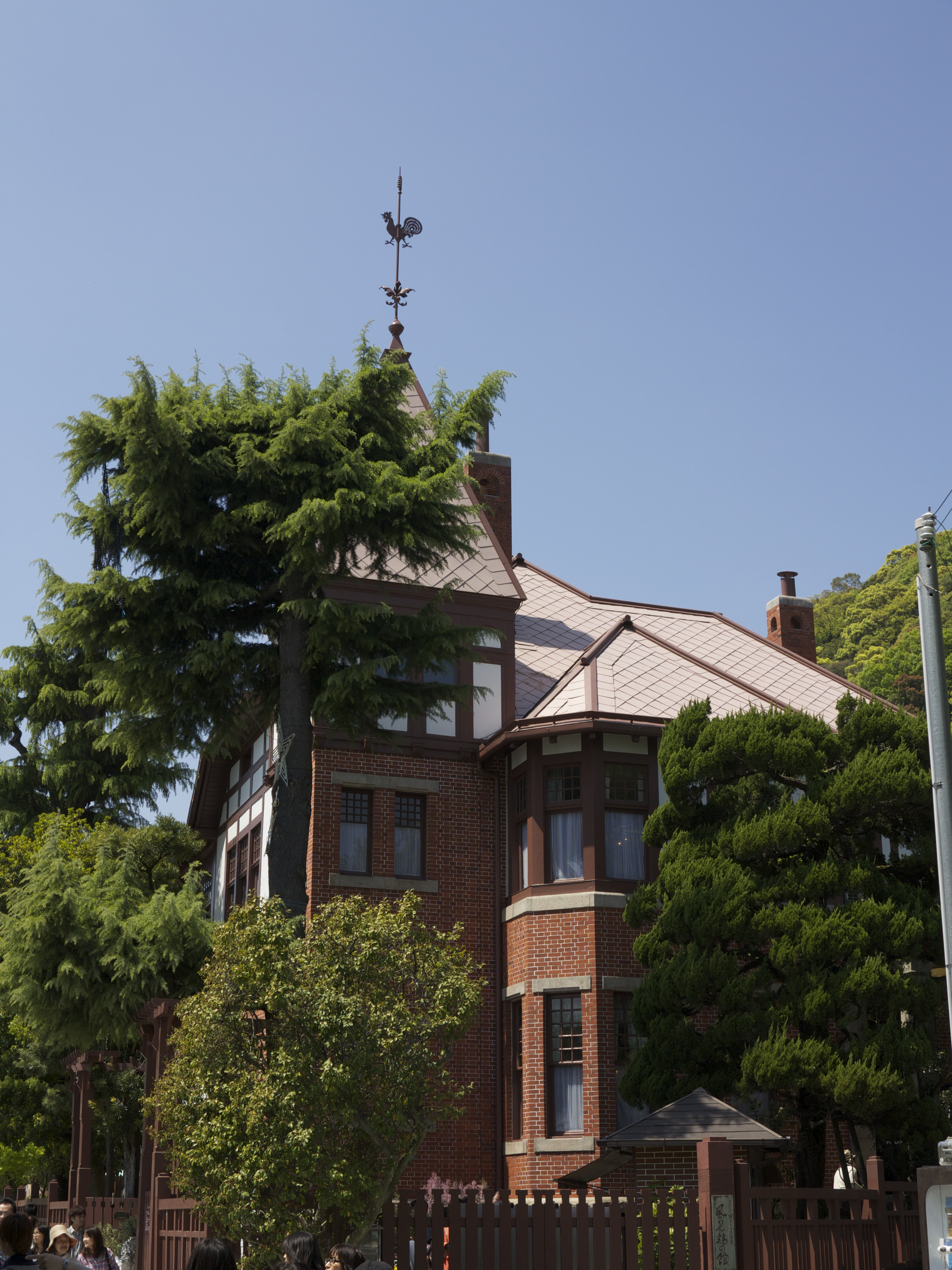 旧トーマス邸(風見鶏の館)